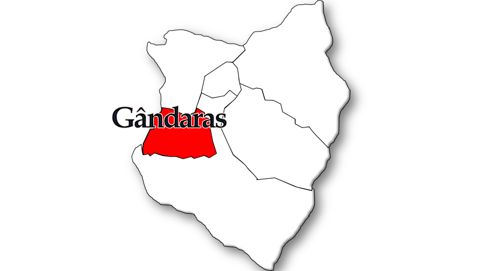 População